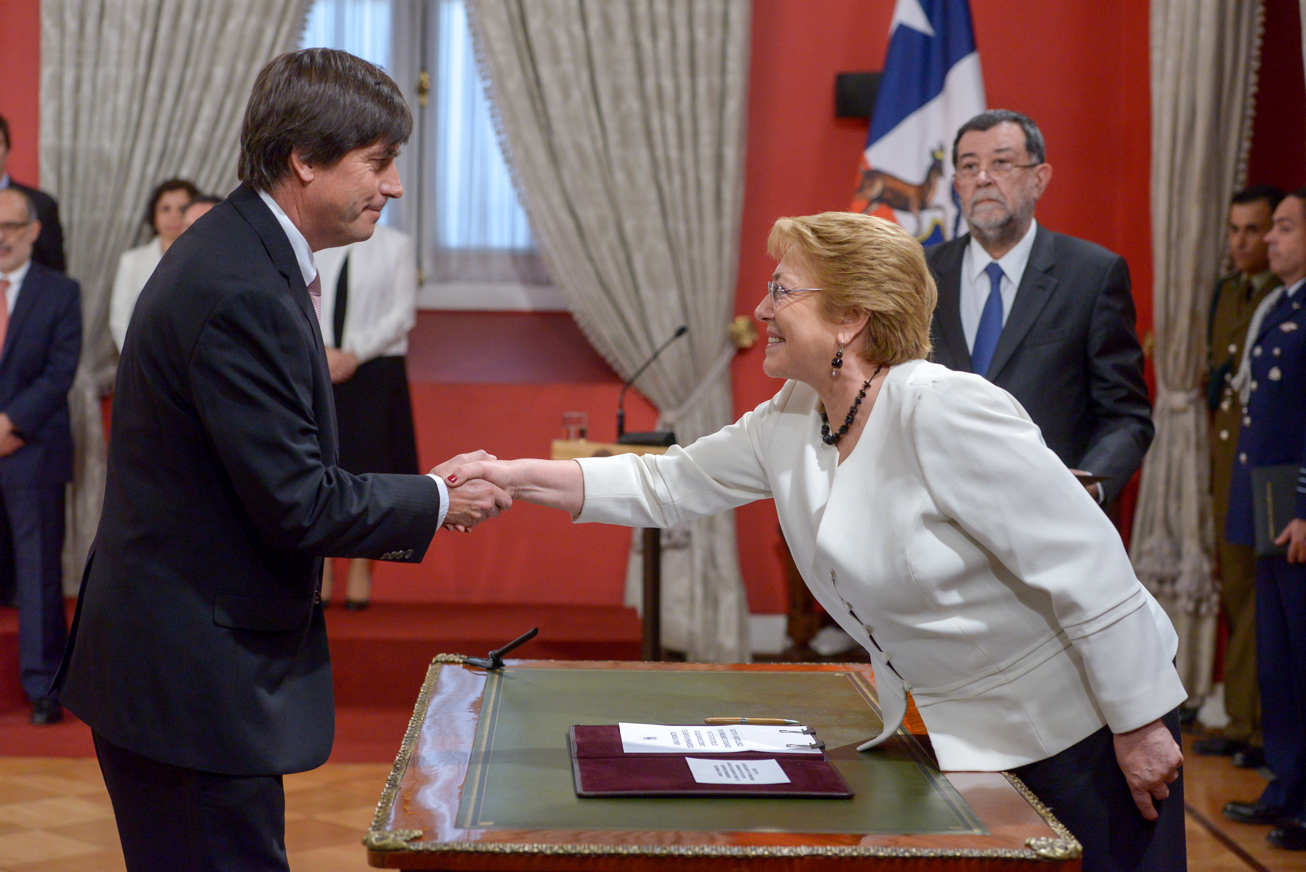 Presidenta de la Republica realiza cambio de Gabinete, donde asume como nueva vocera de Gobierno la Ministra Paula Narváez